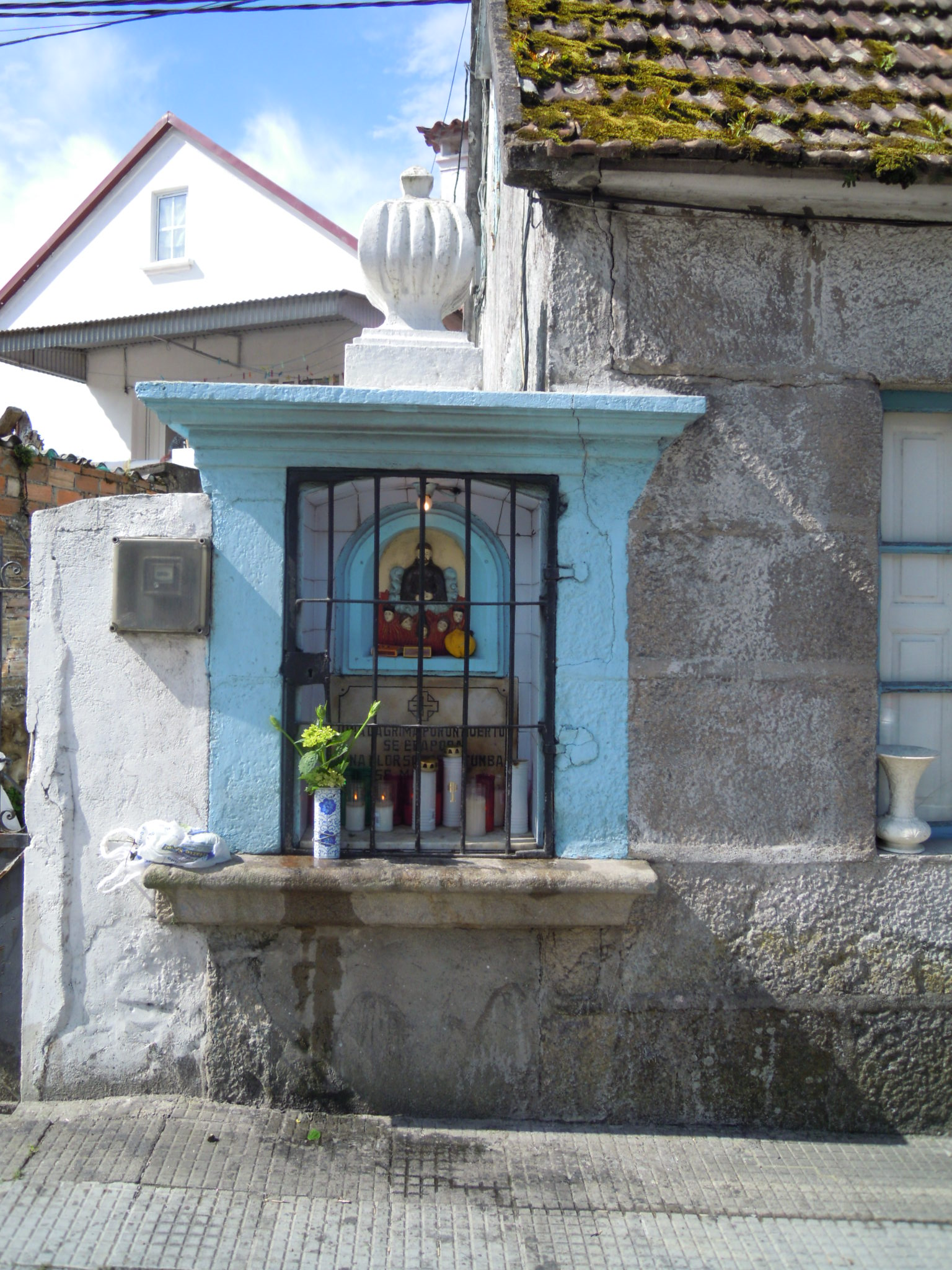 Peto de ánimas nunha casa de Cesantes (Redondela)